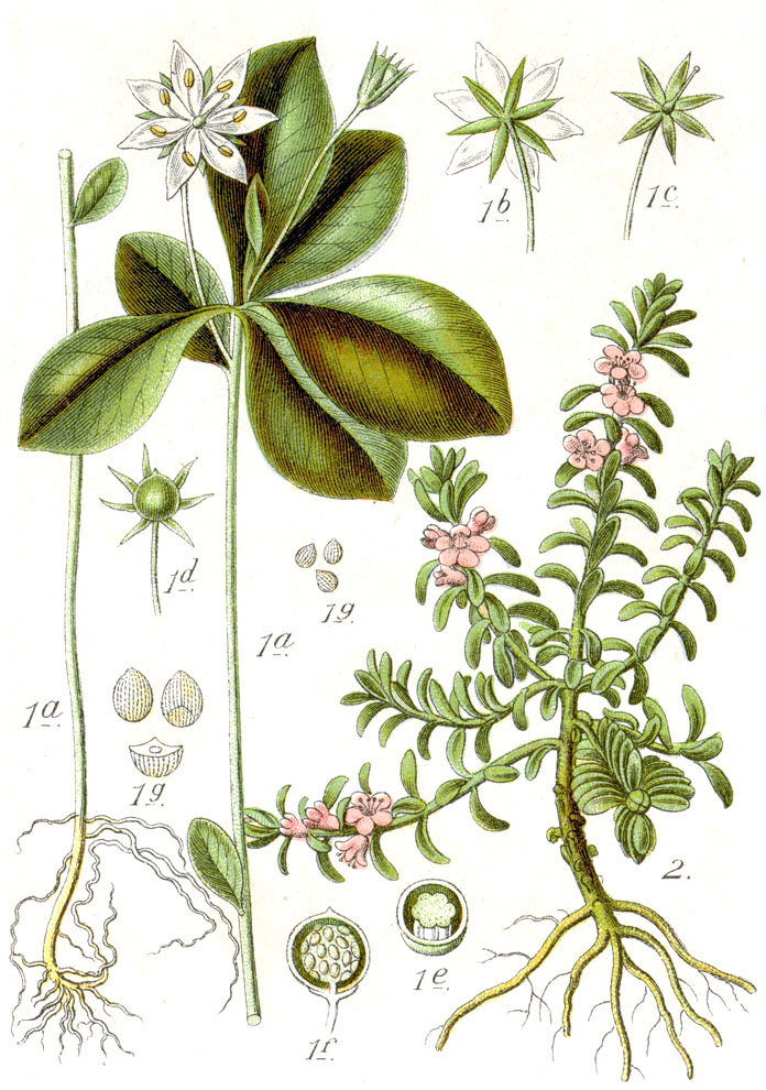 1. Trientalis europaea L., syn. Lysimachia trientalis Klatt 2. Lysimachia maritima (L.) Galasso, Banfi & Soldano, syn. Glaux generalis E.H.L.Krause Original Caption 1. Siebenstern, Lysimachia trientalis 2. Milchkraut, Glaux generalis